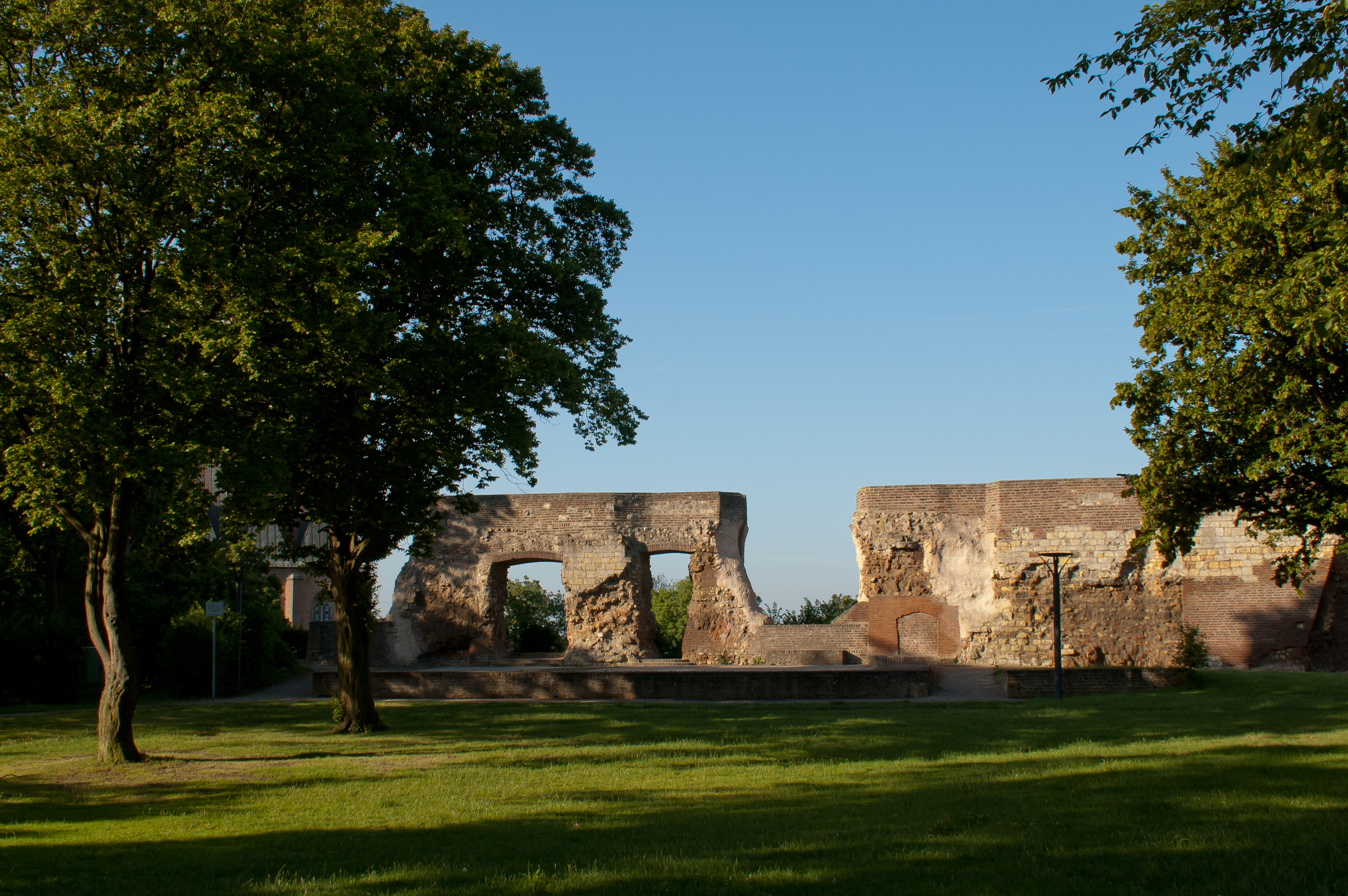 Das Burgbergplateau in Heinsberg, von der Nordostecke aus gesehen, mit den Palas-Resten.